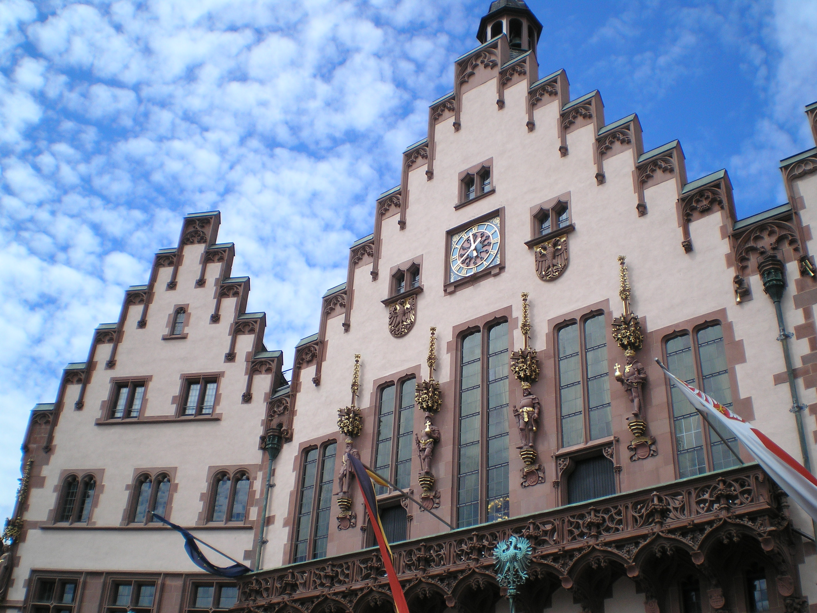 Römerberg in Frankfurt-Altstadt.